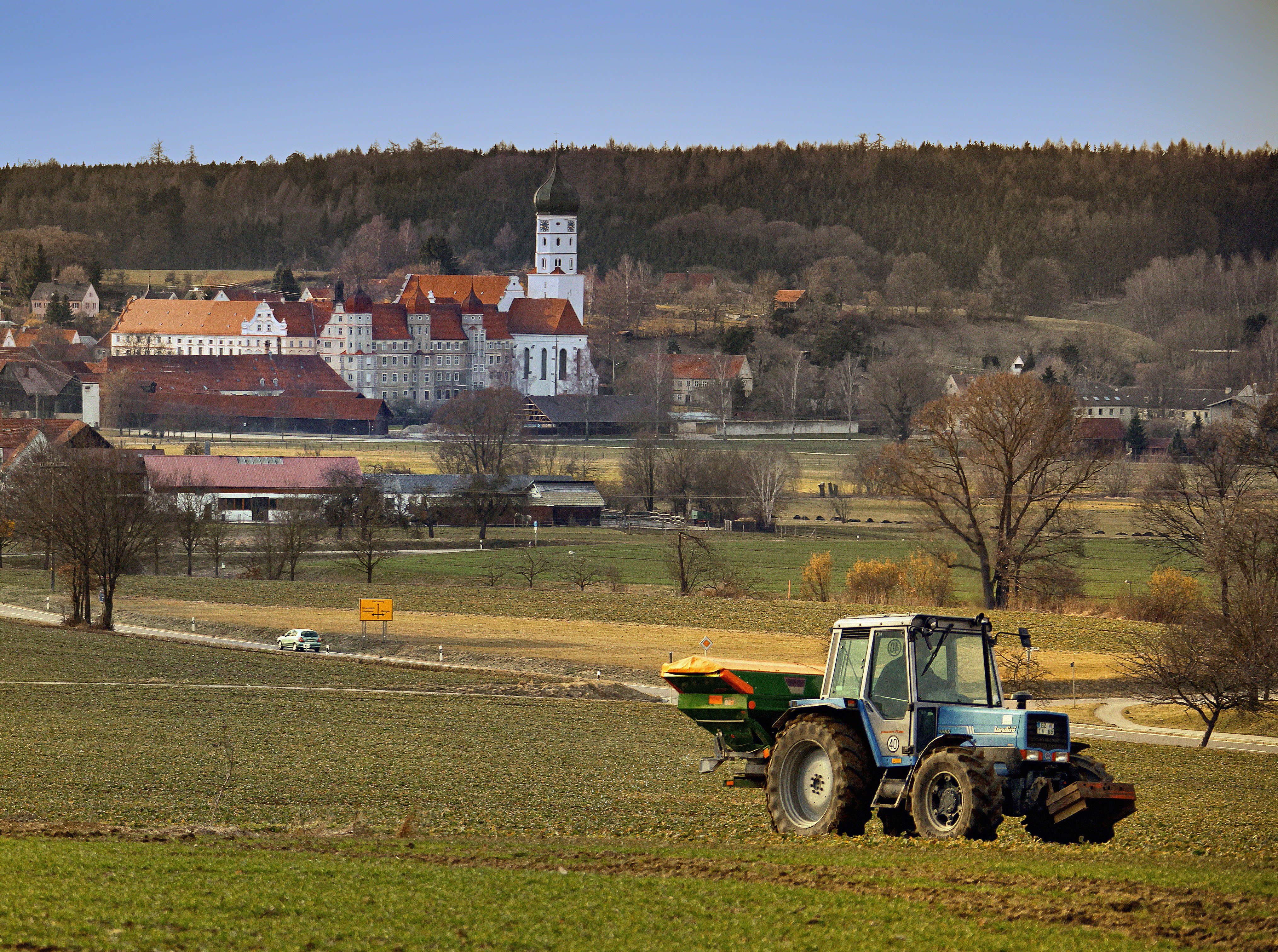 Wettenhausen